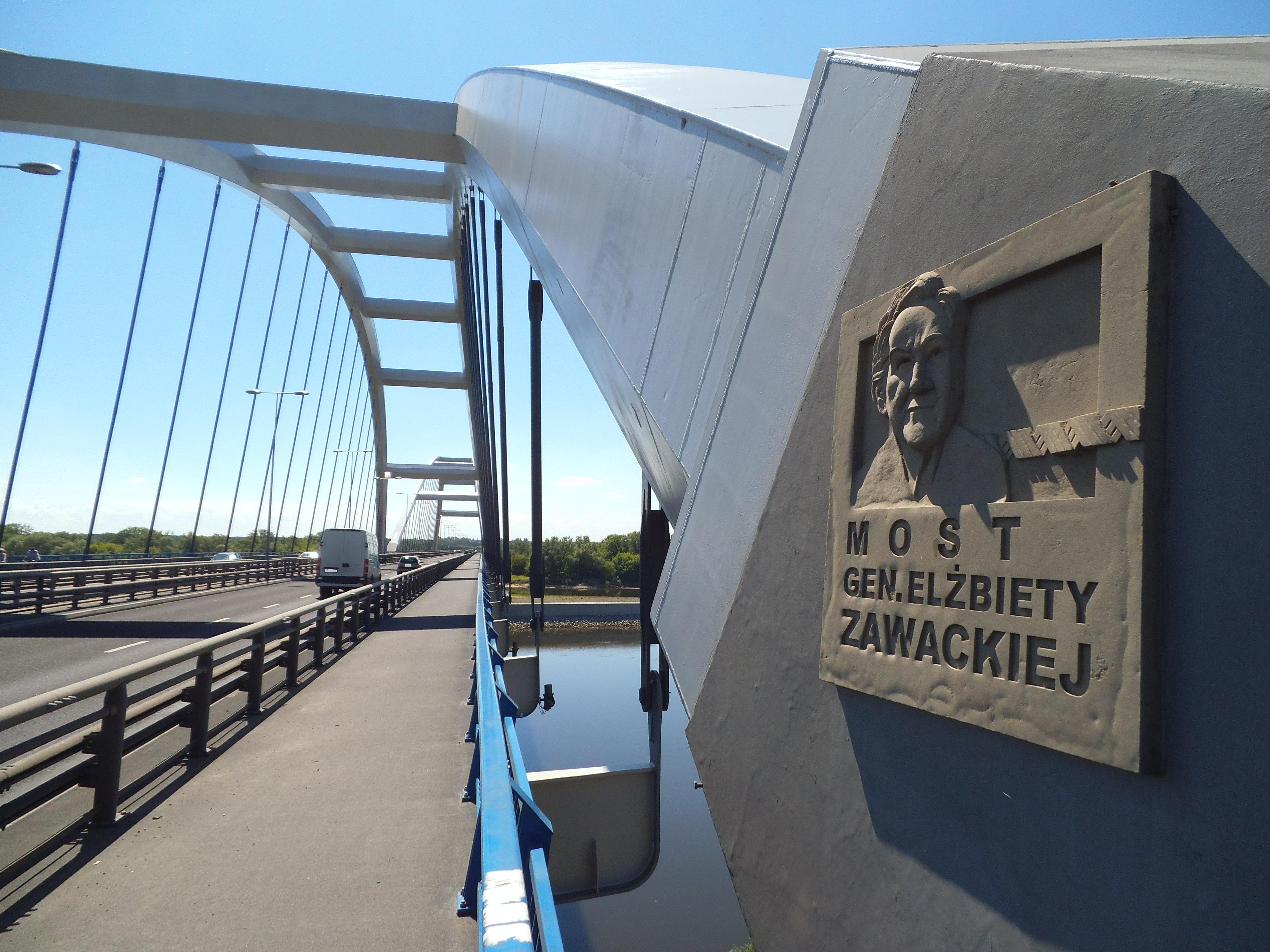 Nowy most w Toruniu